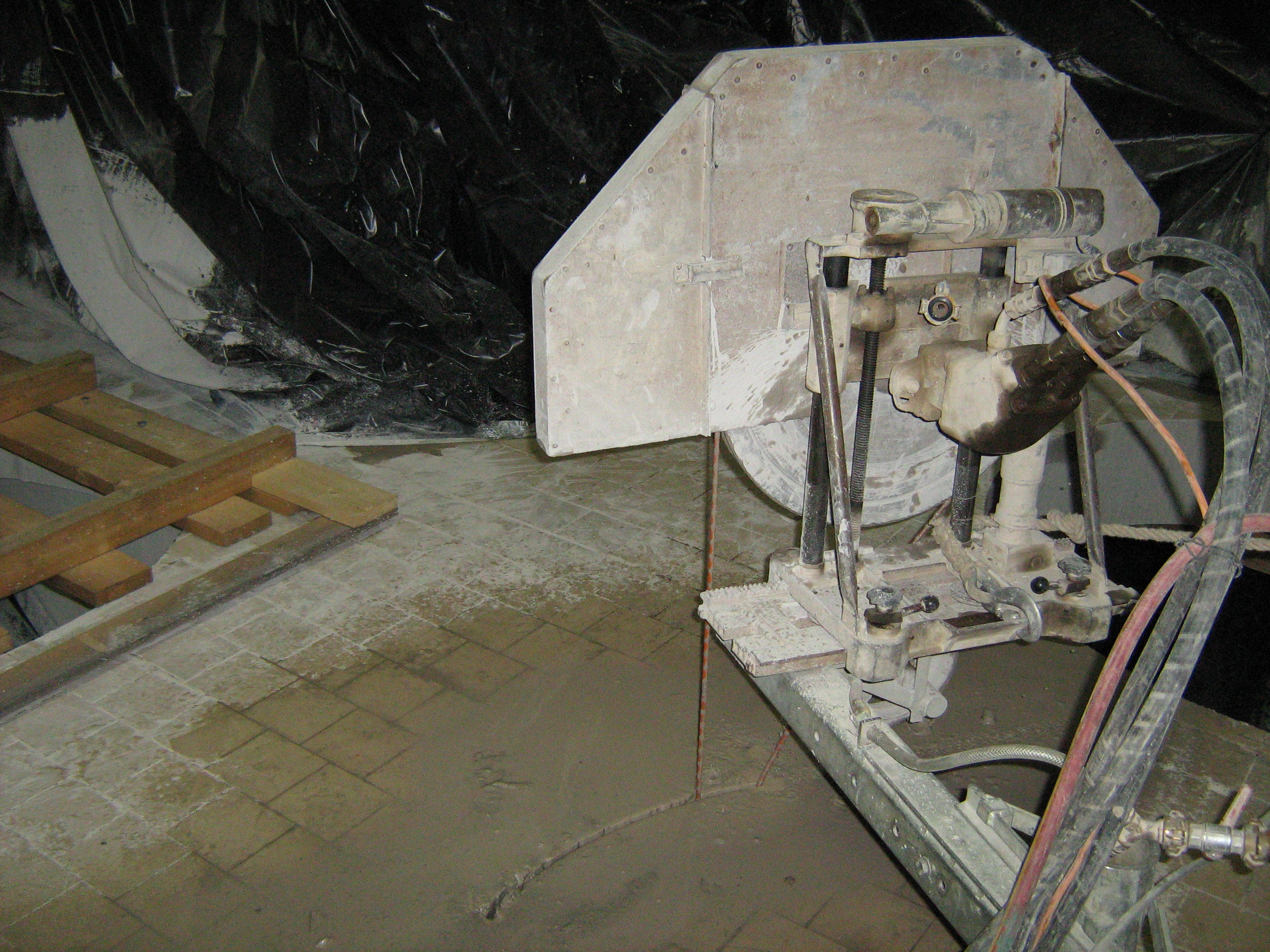 Zirkelkreissäge beim Betonschnitt